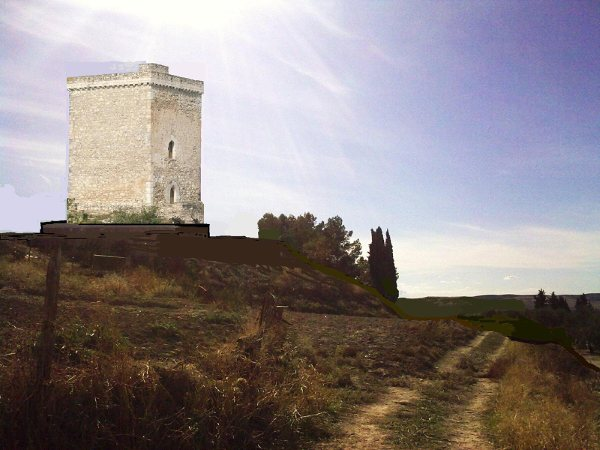 Descripción de como era aproximadamente el Castillo de Montalván (Montalbán de Córdoba)